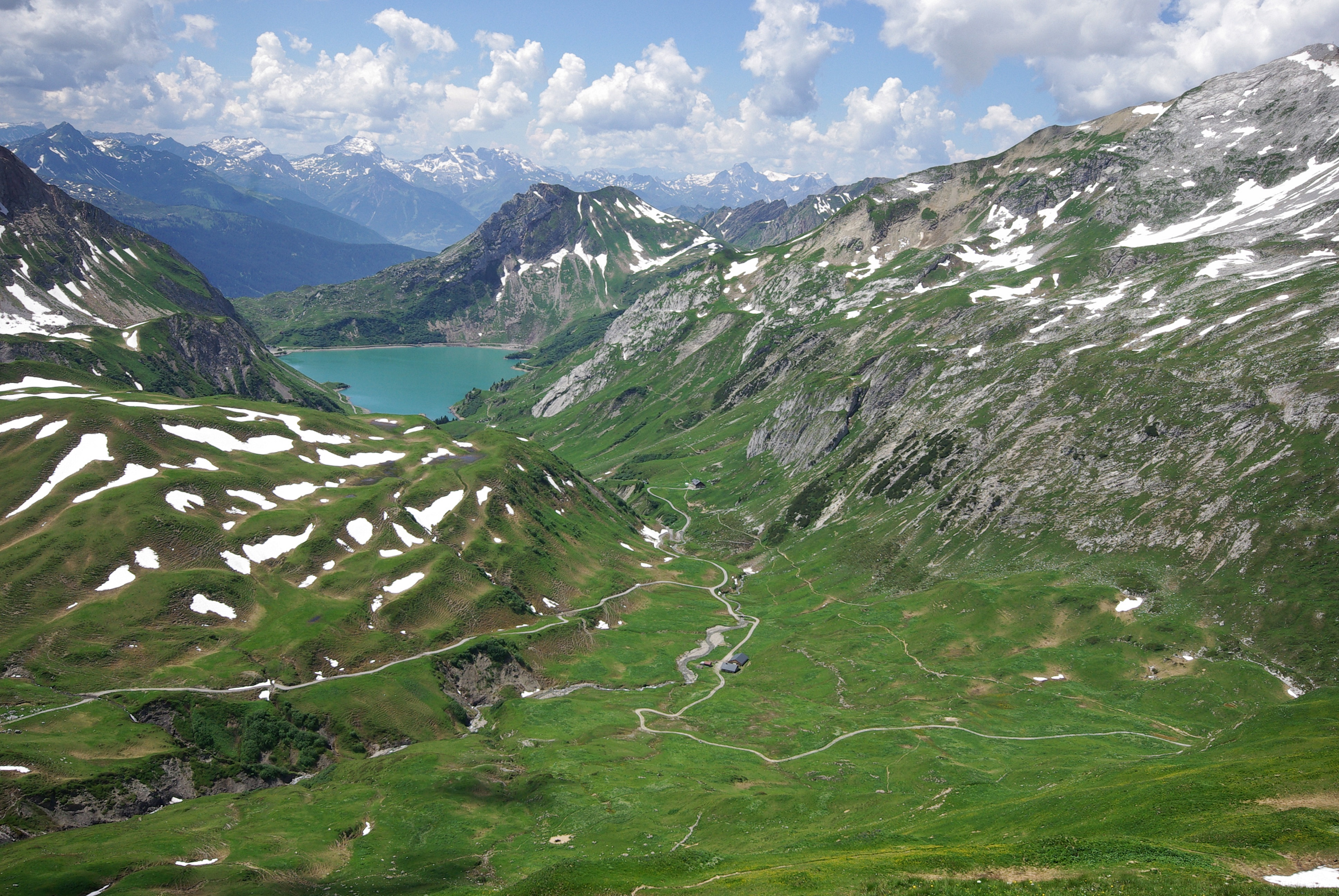 Blick über Brazer Stafel und Ravensburger Hütte (im Vordergrund) und den Spullersee in Richtung Rätikon mit Drusenfluh, Drei Türmen, Schesaplana und Zimba